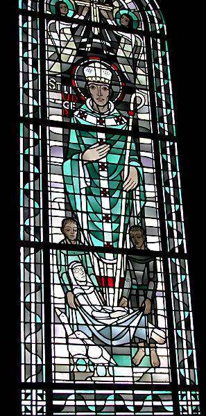 Buntglasfenster mit hl.Lutger. Urbanus Kirche. Dorsten-Rhade.